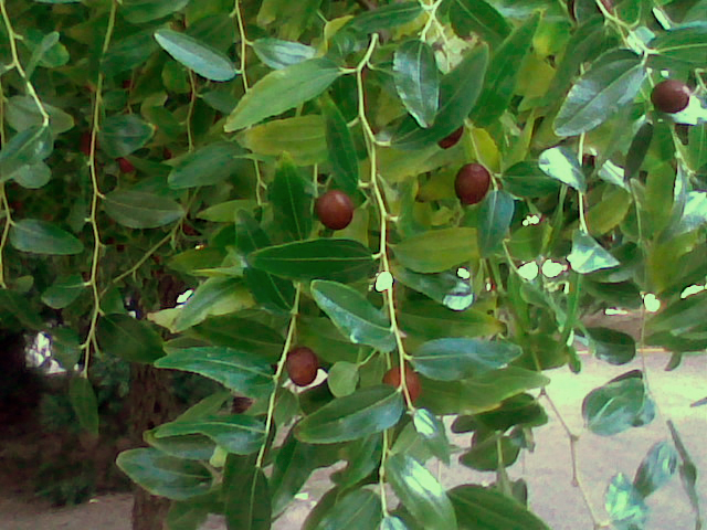 Ziiphus zizyphus, leaves and ripe fruits Bellpuig de les avellanes, Catalonia